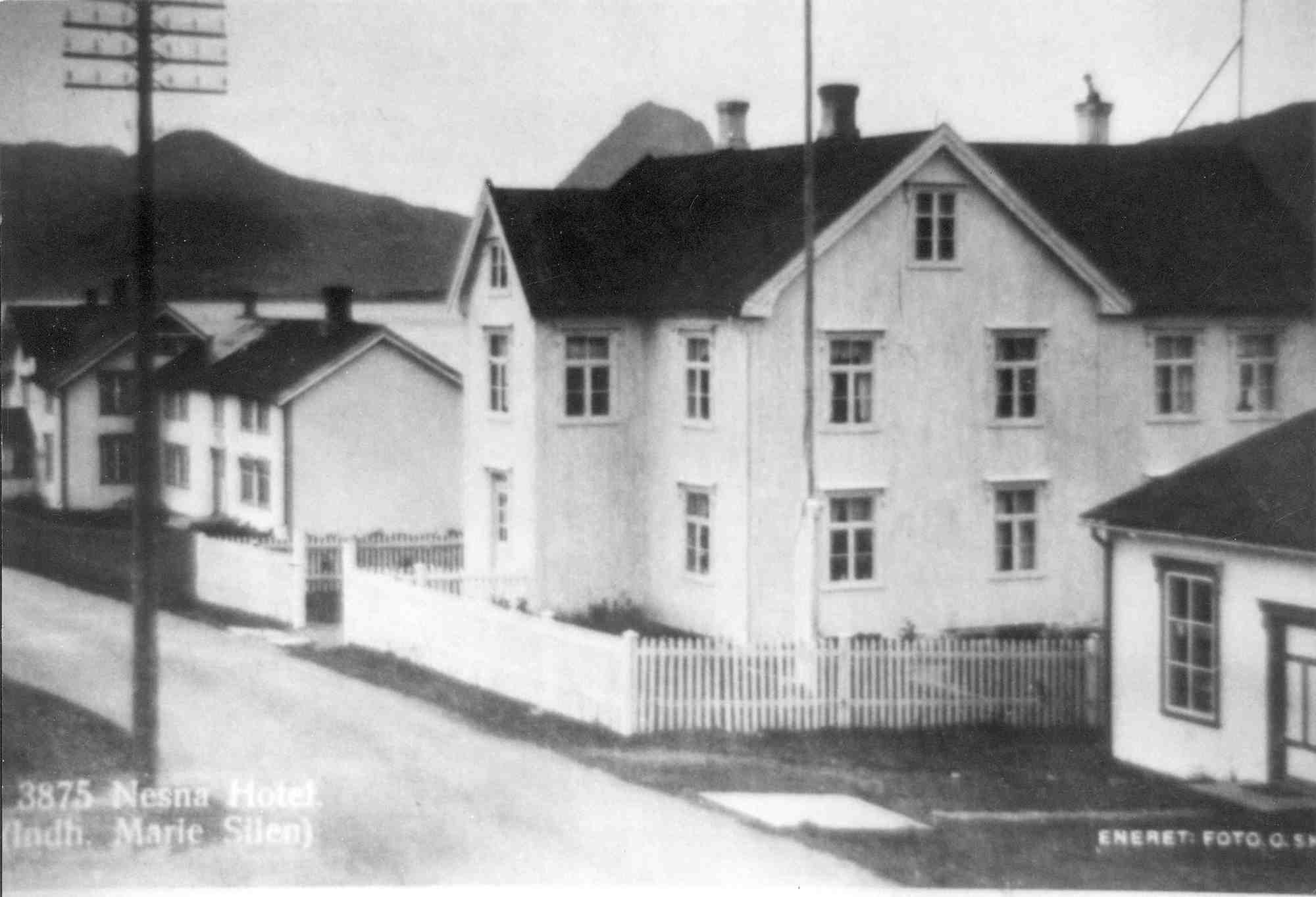 Bilde av Marie Silens hus på Nesna.